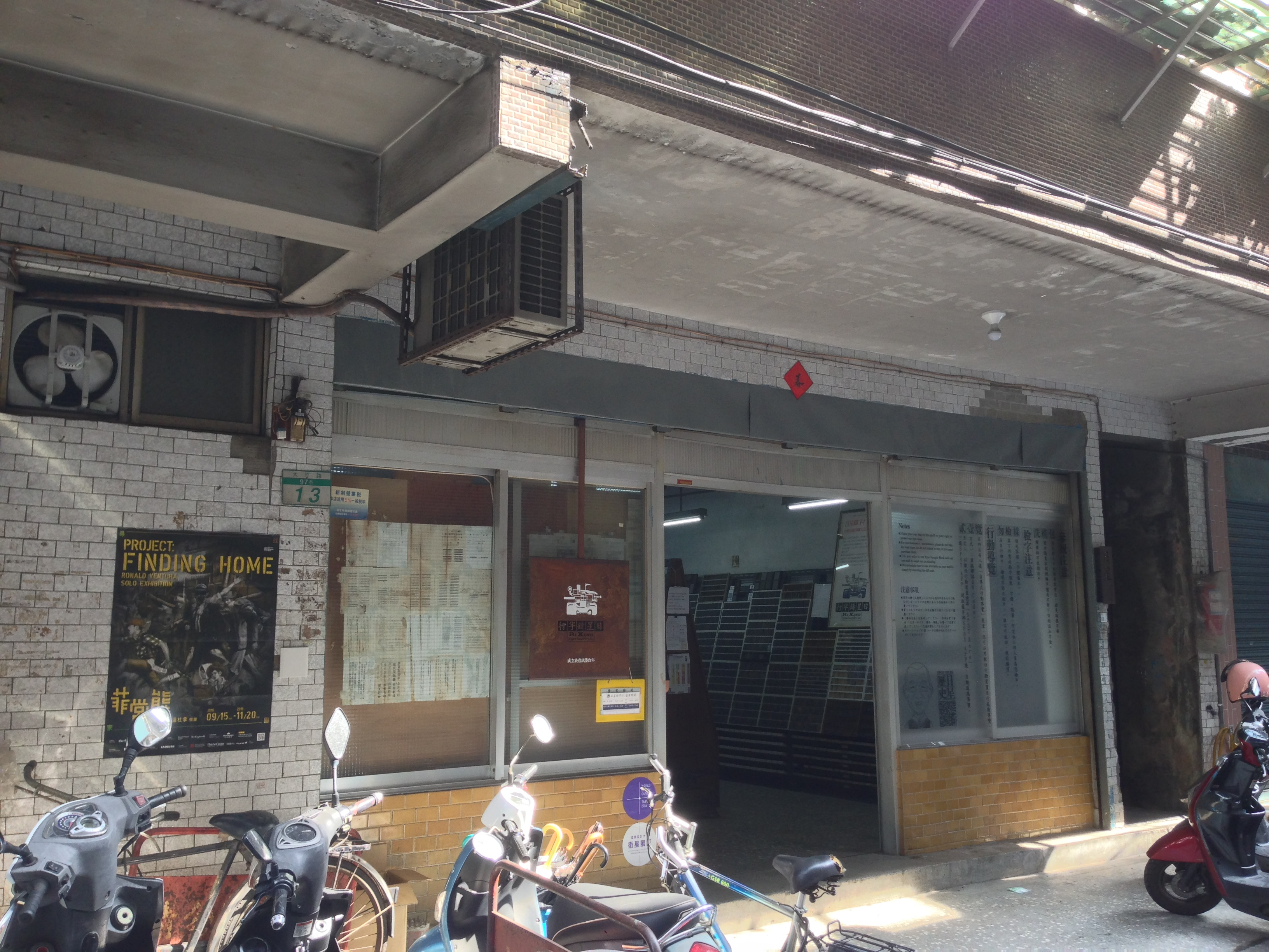 中文（台灣）: 日星鑄字行店面